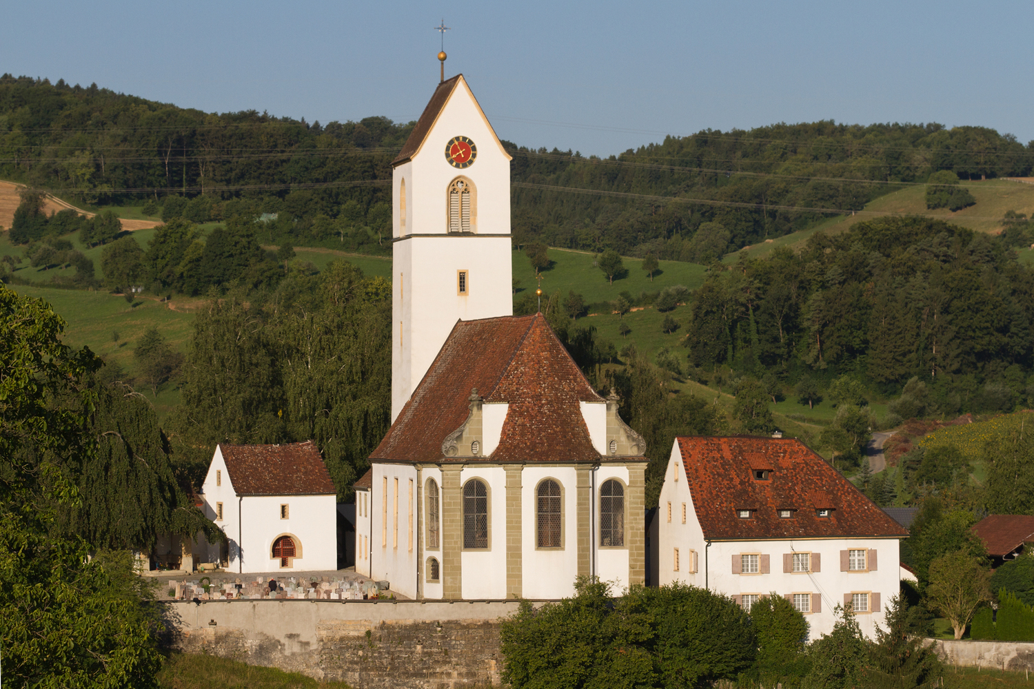 Beinhaus, Kirche St. Niklaus und Pfarrhaus in Herznach (AG)